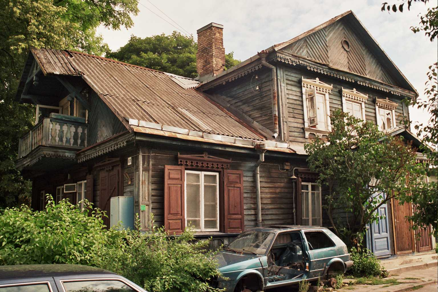 Mi faris tiun foton kaj permesas ĝian uzadon.